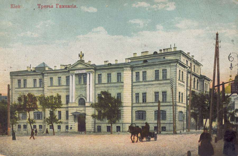 Вид Киевской 3-й гимназии в начале XX века.